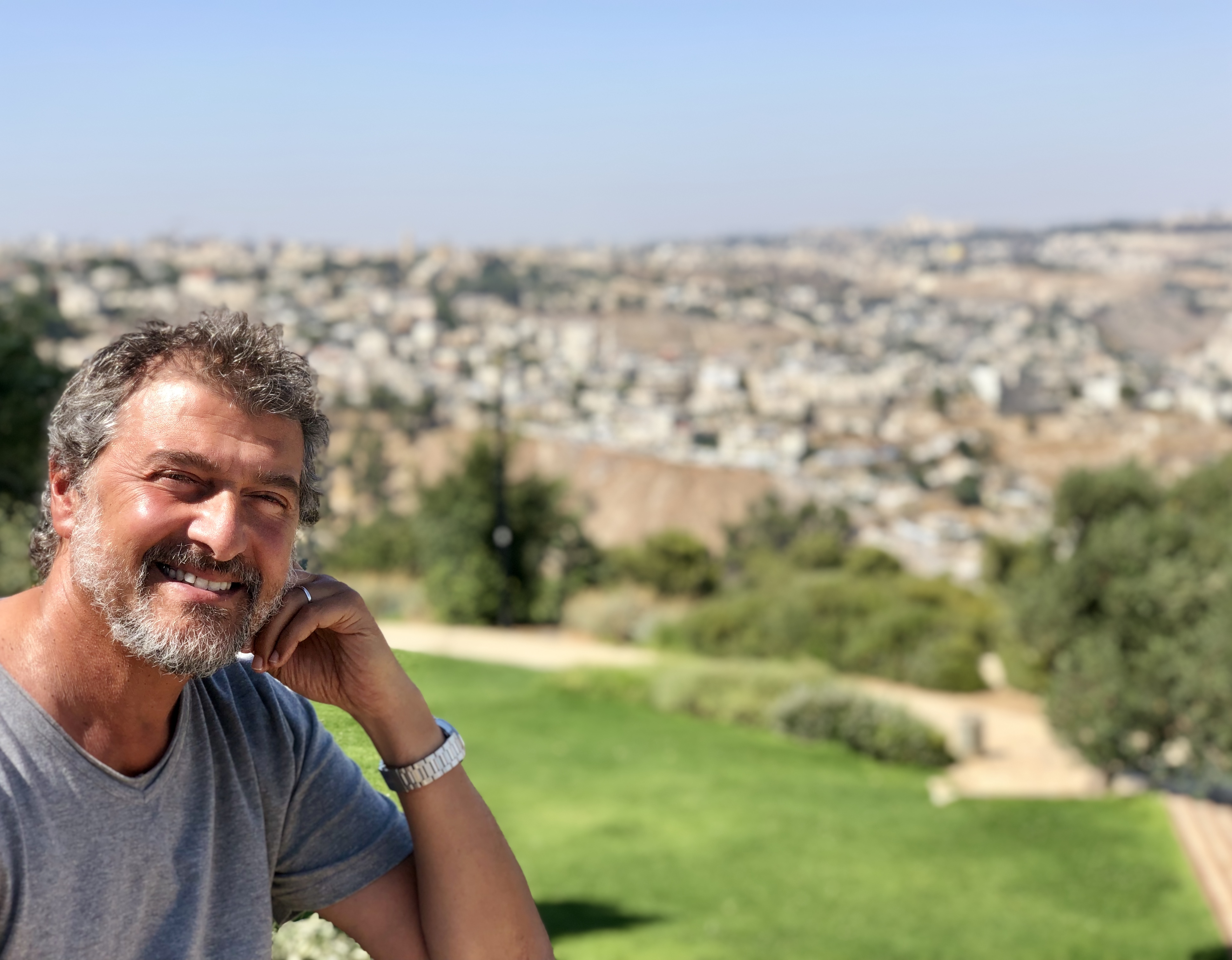 Daniel Levi lors de sa tournée en Israël, ici à Jérusalem (26 août 2019)